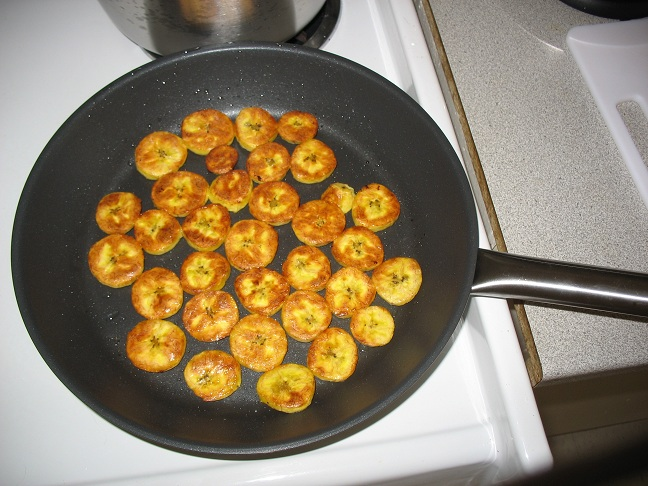 Жареный кормовой банан (plantain)